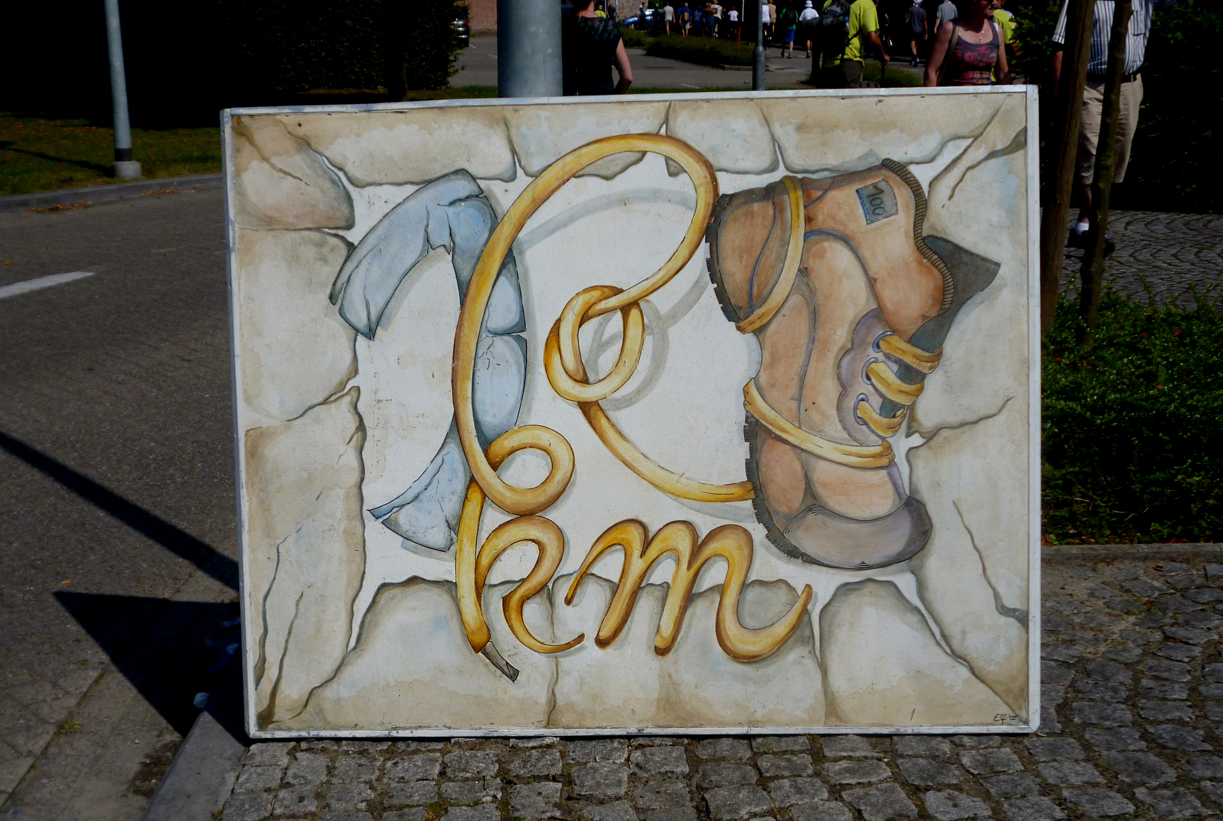 Dodentocht Bornem 1 km